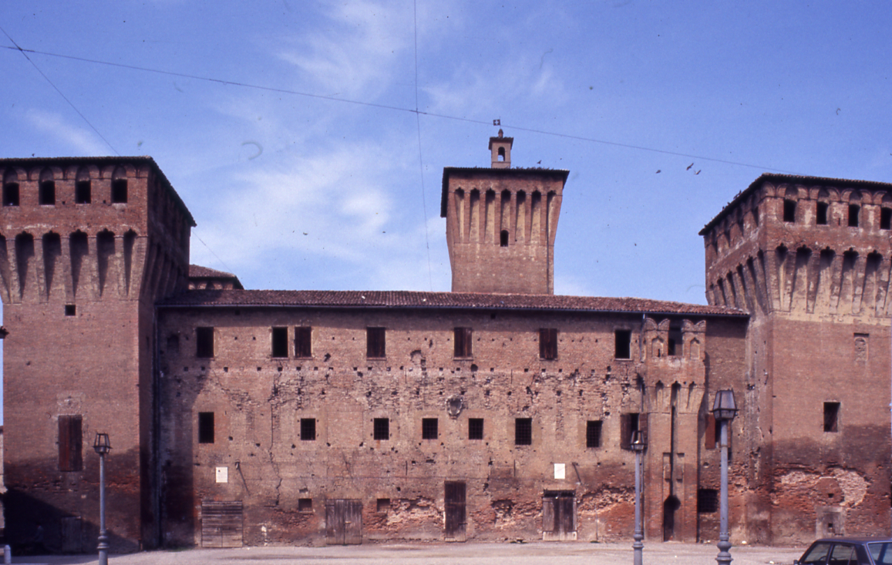 Rocca Estense di Finale Emilia. Original description